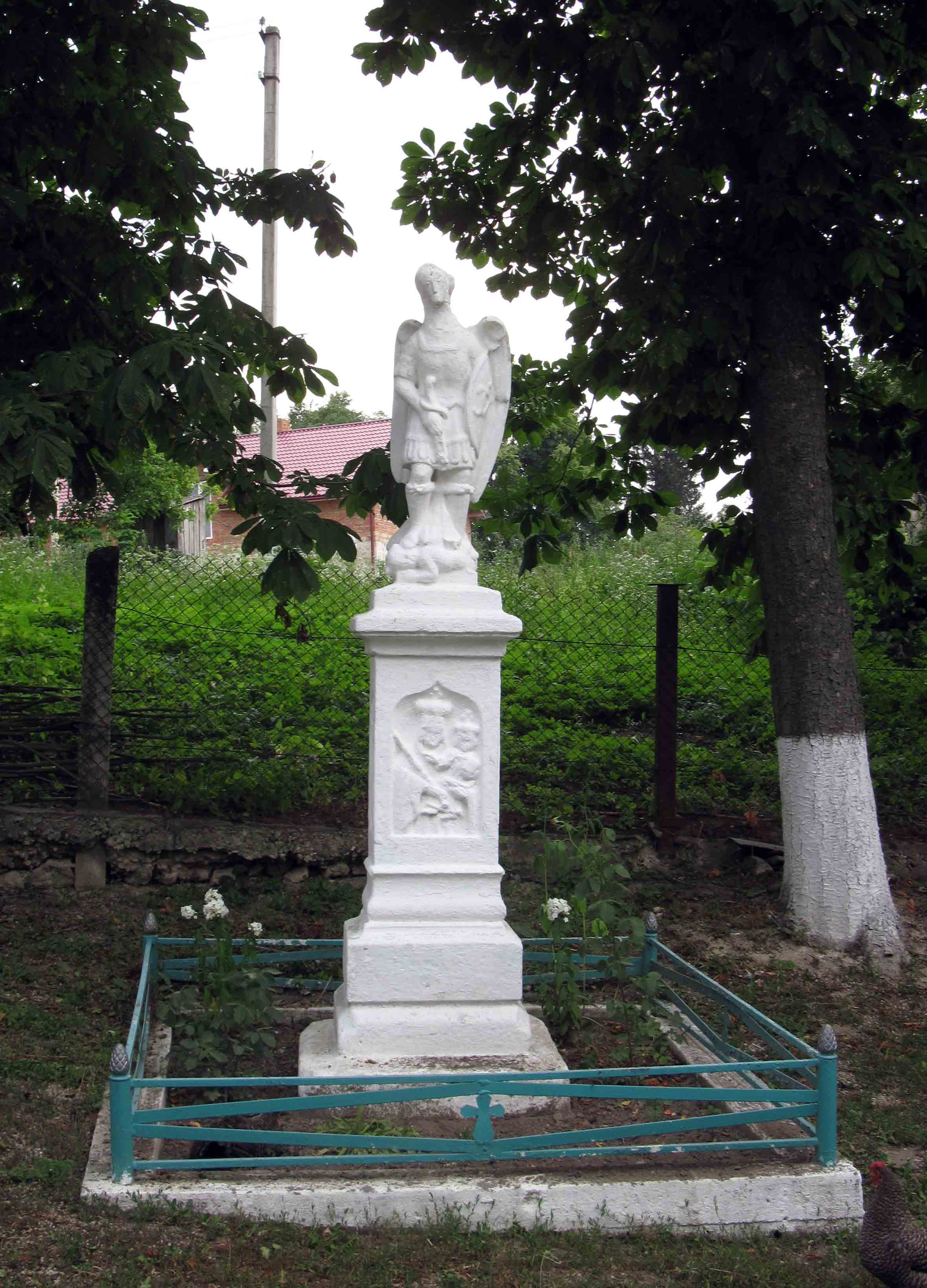 Фігура ангела-хоронителя на честь закінчення будівництва церкви (1875) у Загір’ї Зборівського району Тернопільської області